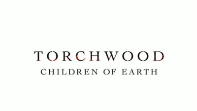 Logo de la saison 3 de Torchwood.